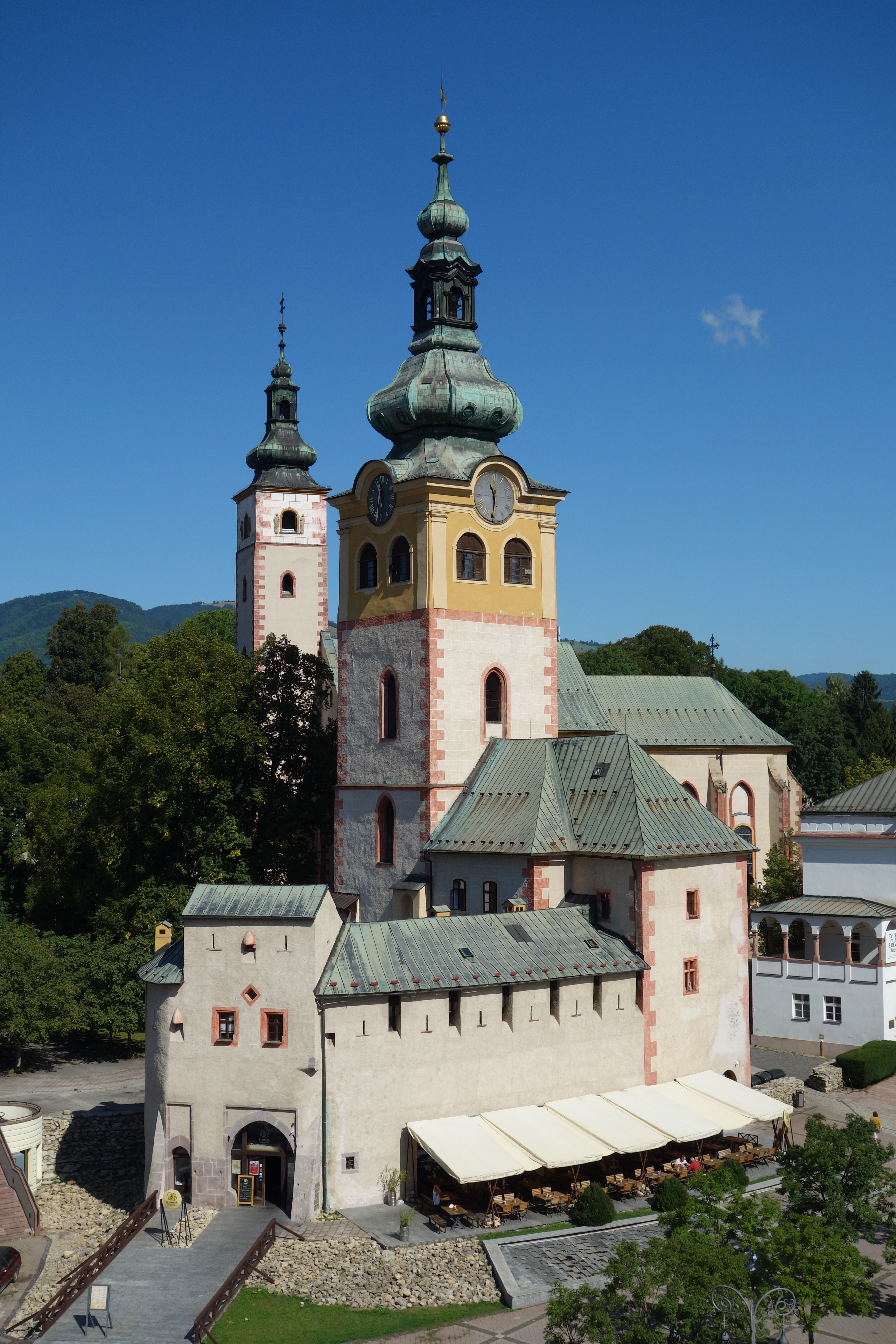 Mestský hrad v Banskej Bystrici